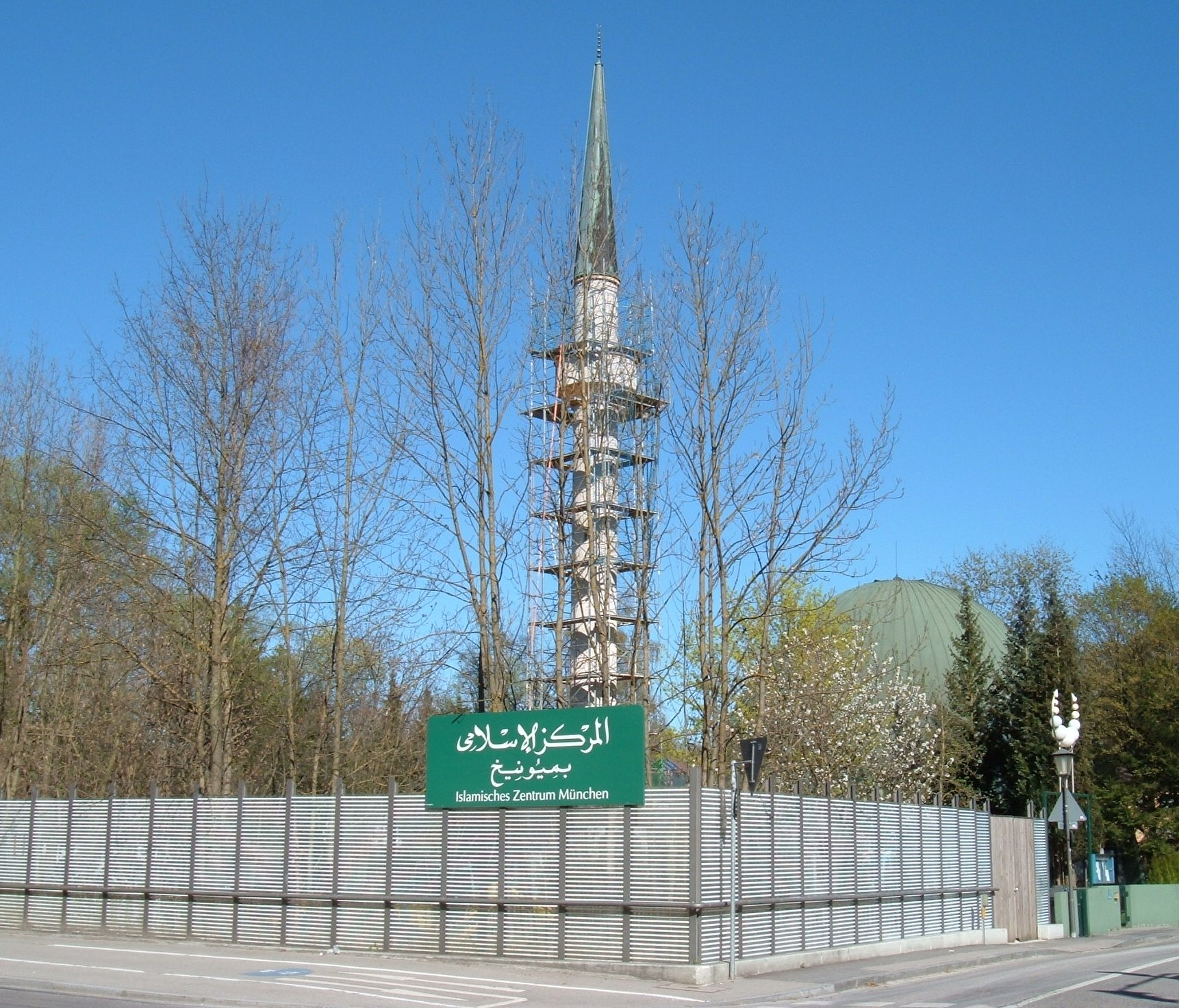 Moschee Freimann, München